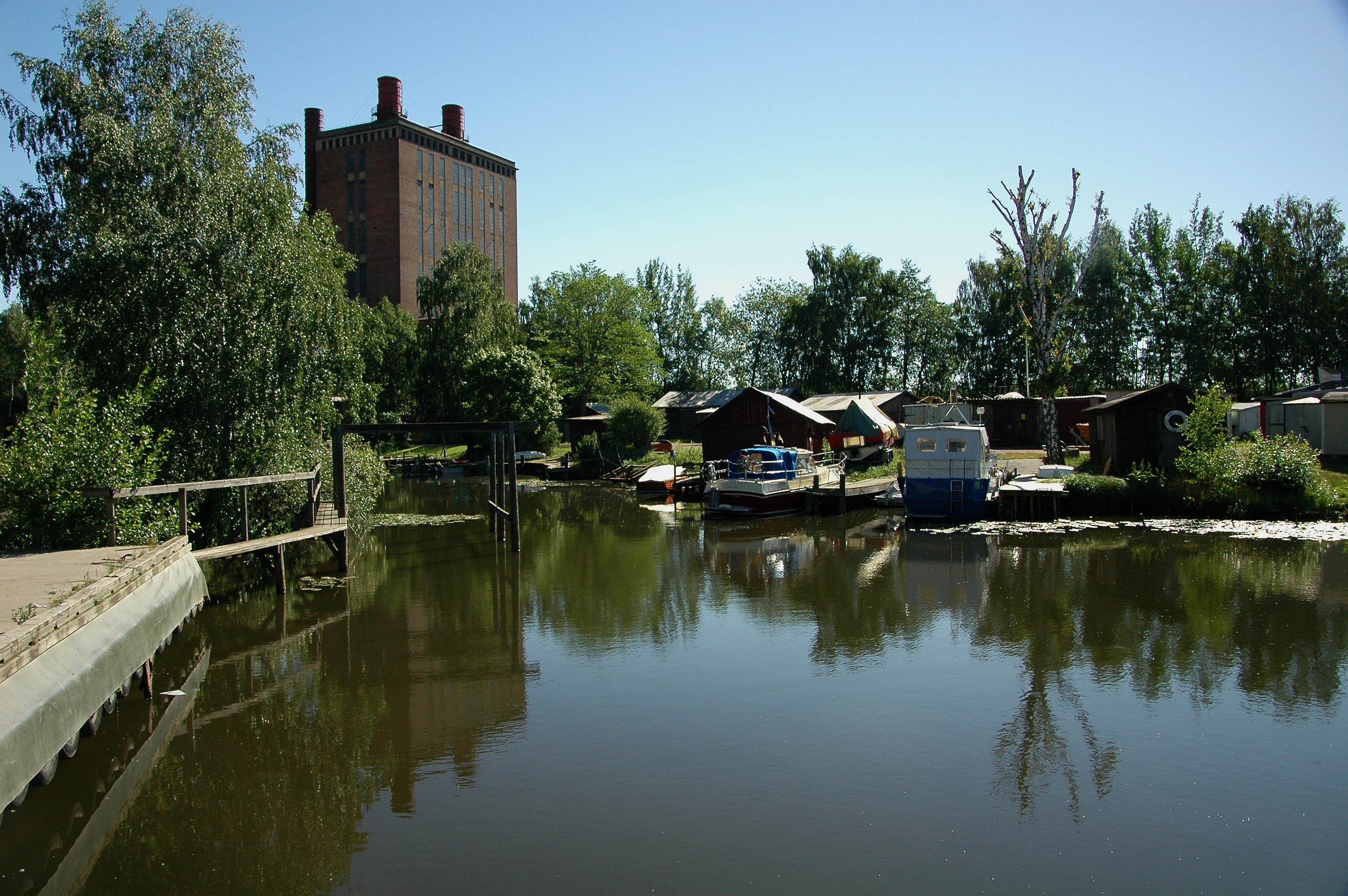 Västerås gamla ångkraftverk, Västerås